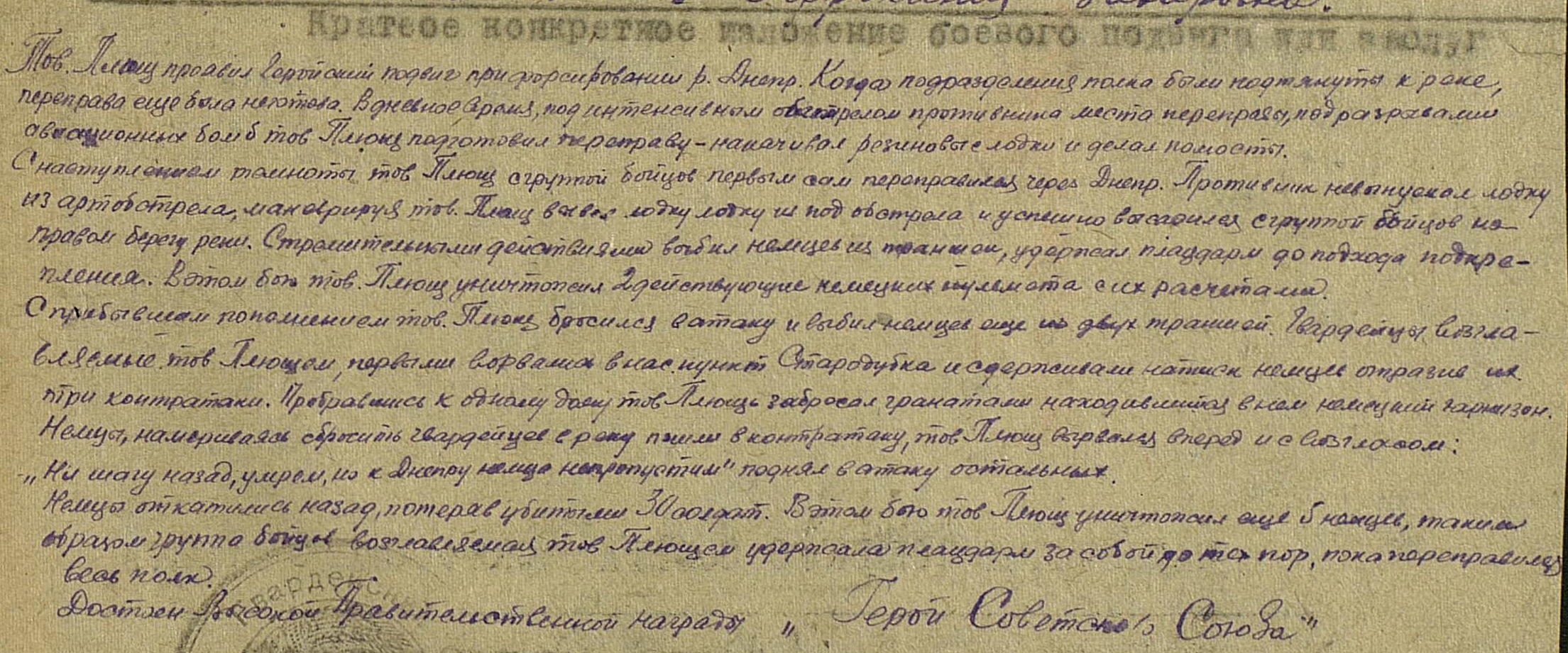 Подвиг